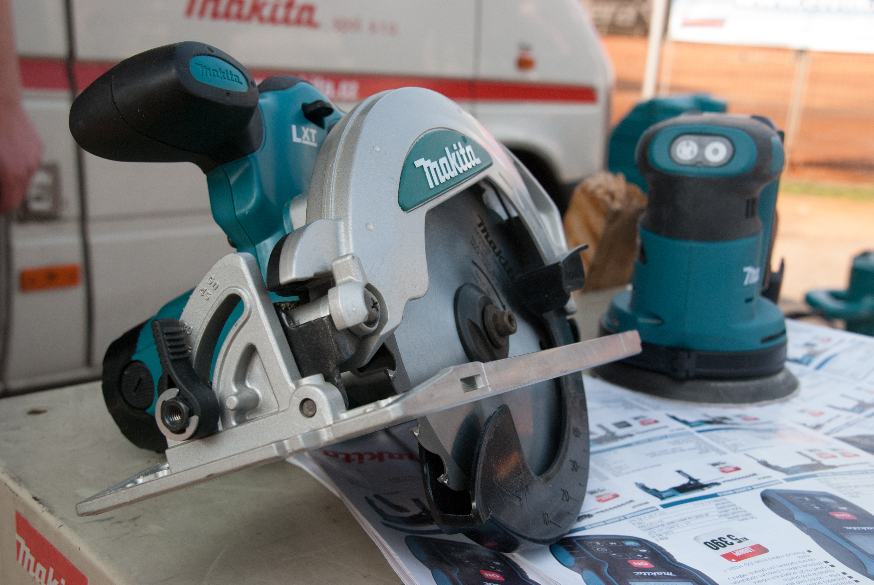 Detail kotoučové pily Makita - Poskytnuto pro ELVIN PRODEJ s.r.o.